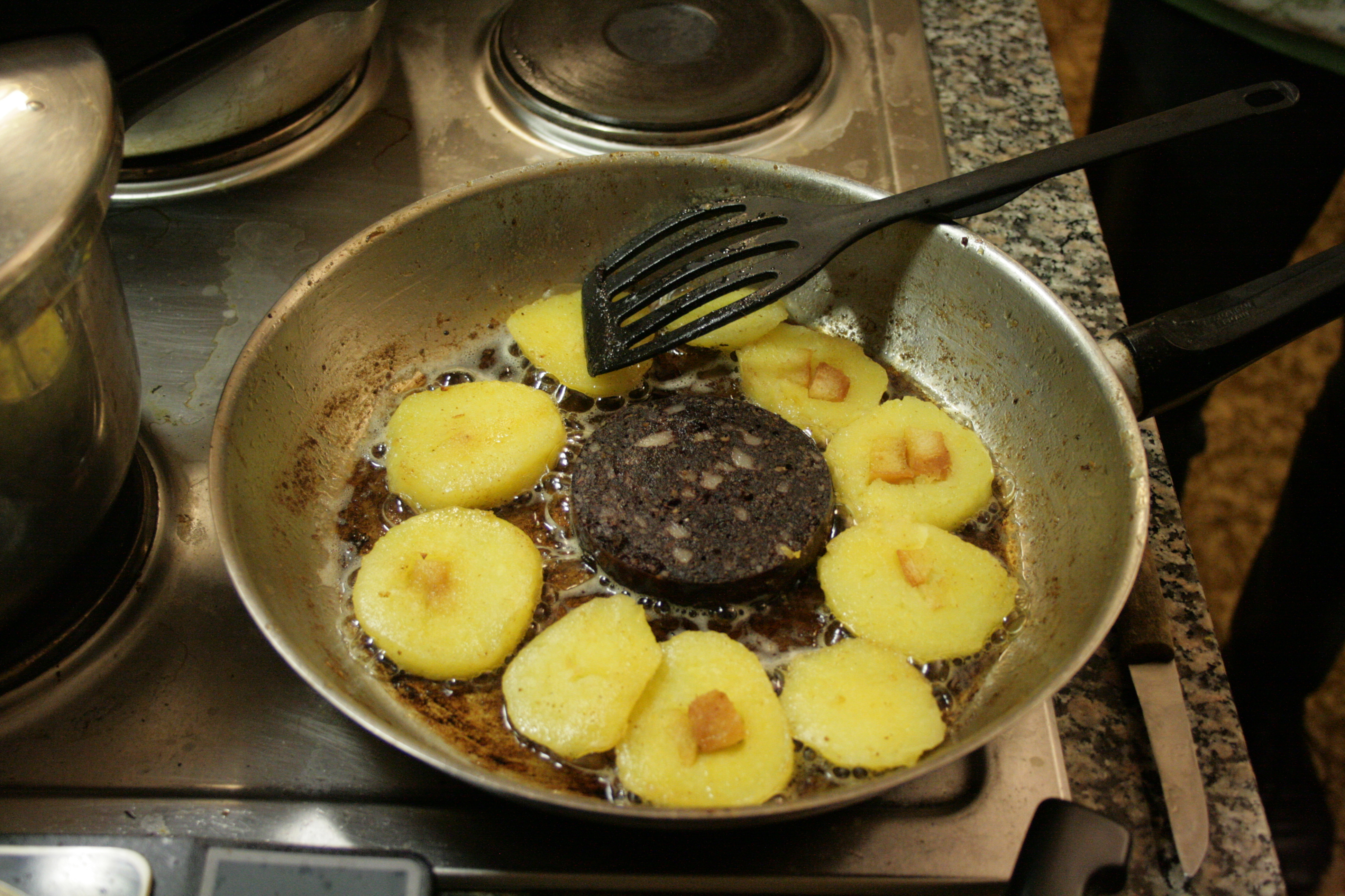 Wurstebrot mit aufgeschnittenen Klössen in einer Bratpfanne